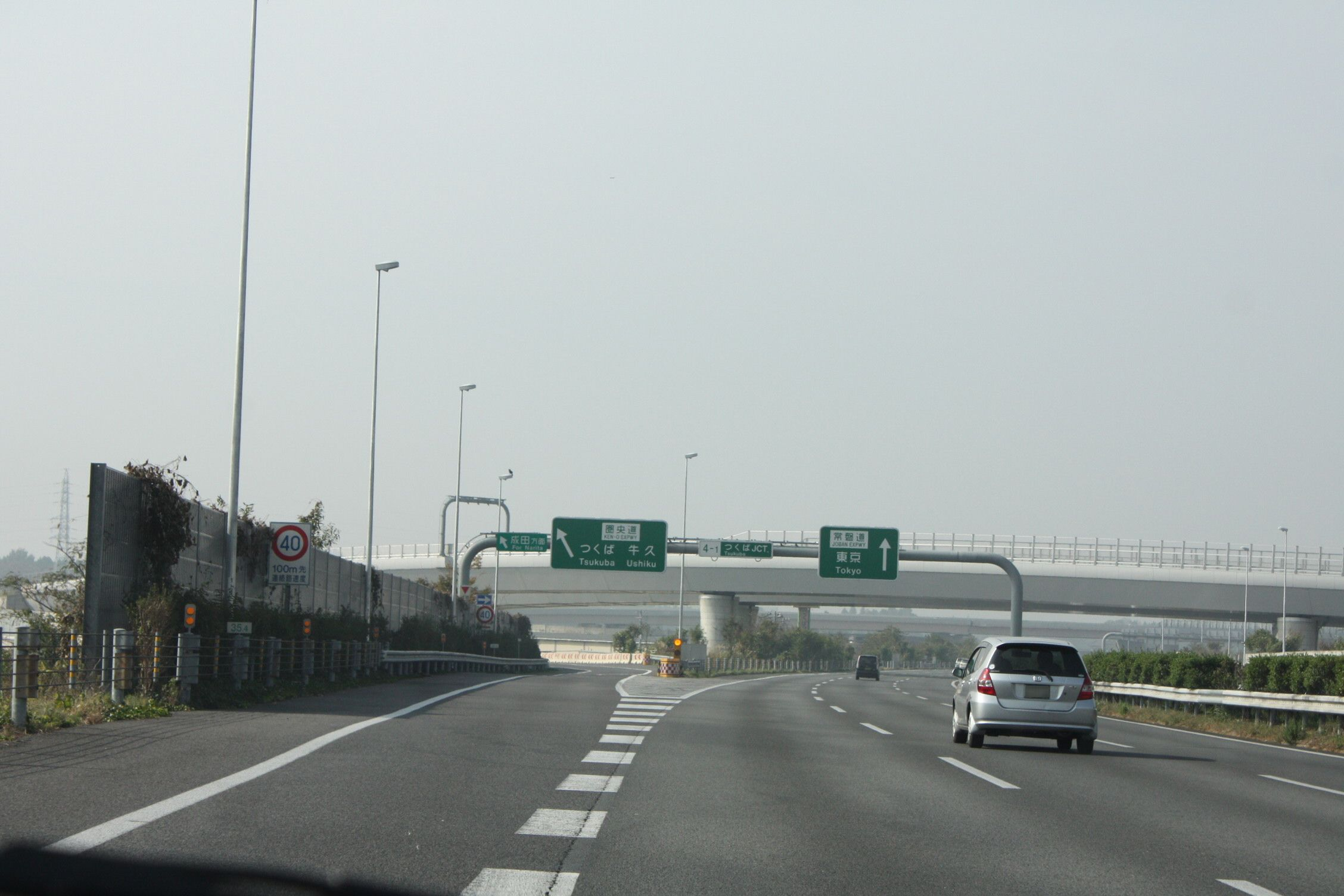 つくばジャンクション